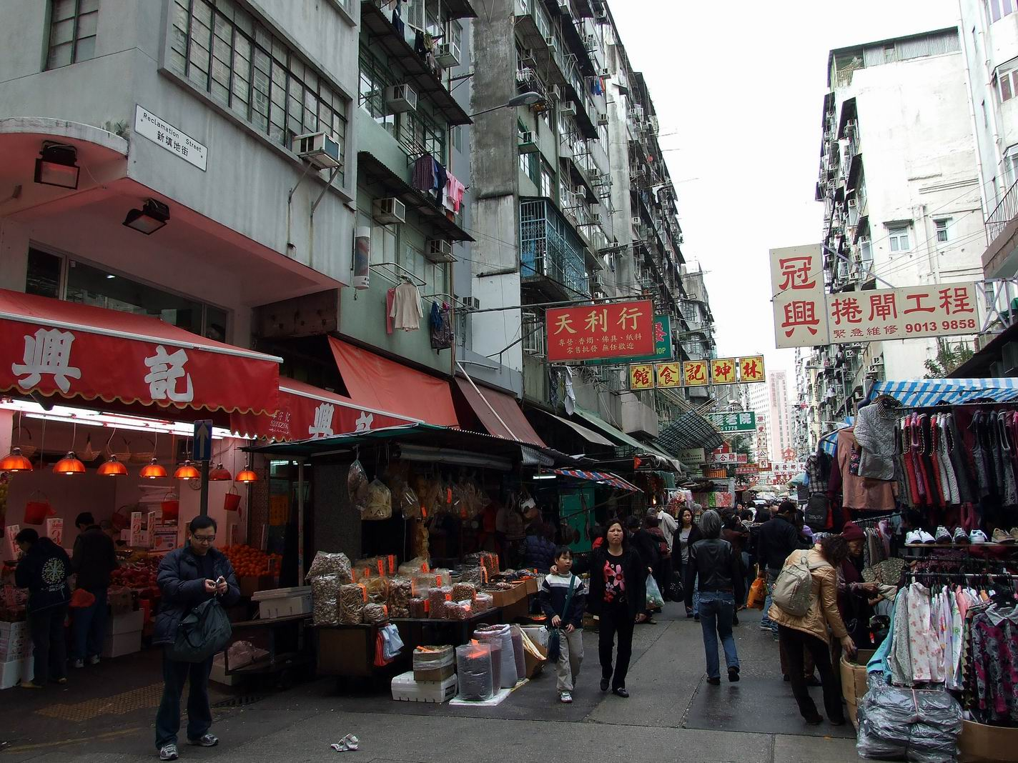 官涌新填地街